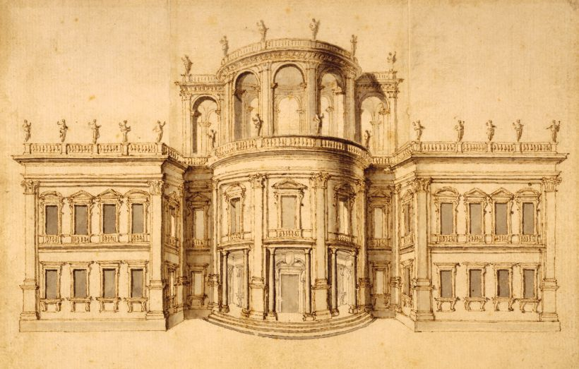 Zeichnung für eine Villa, römisch, um 1680